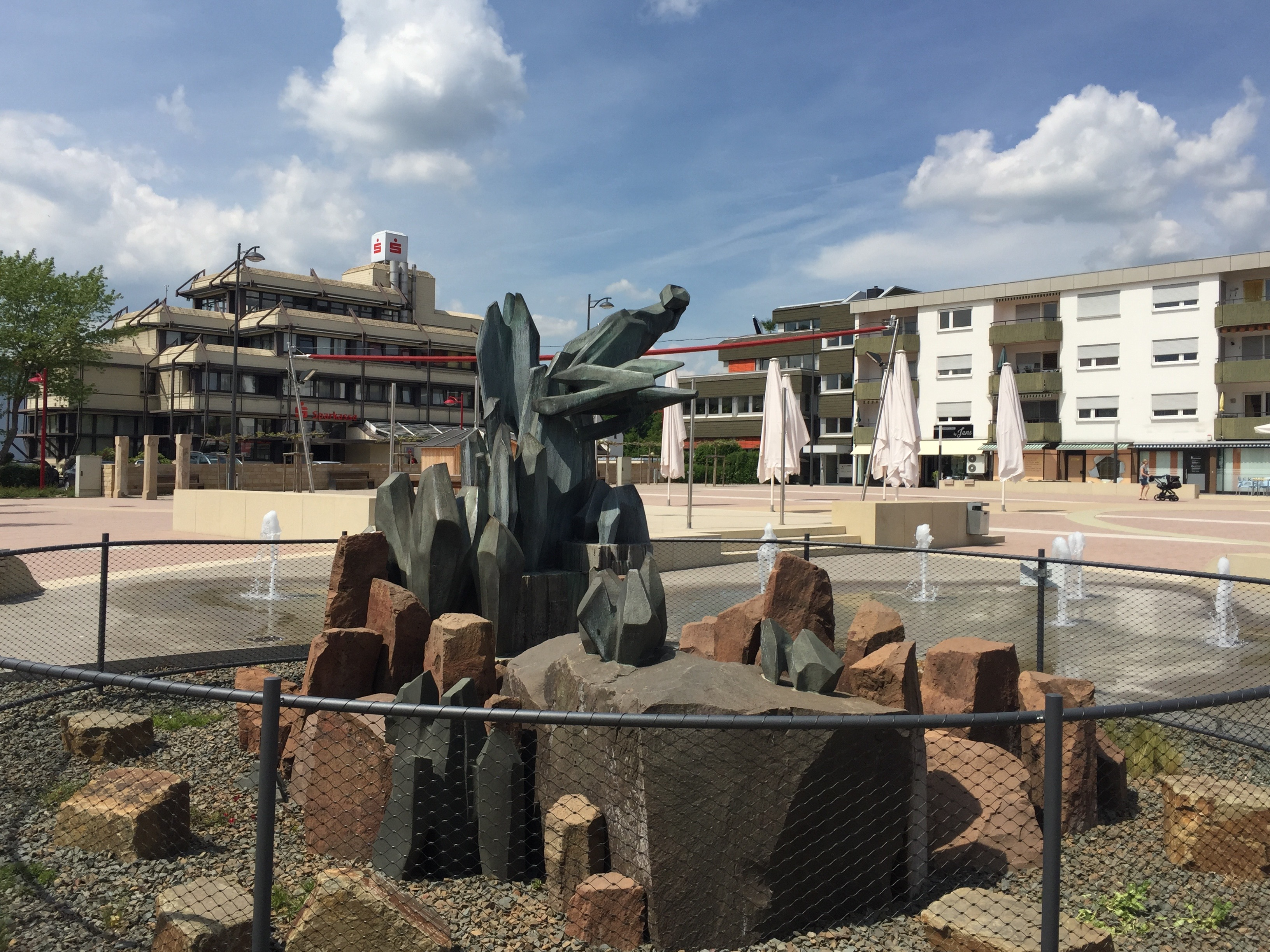 Marktbrunnen in Waldmohr, errichtet 1980, Bildhauer: Heinrich Betz, Titel: "Vogel erhebt sich aus dem Schilf", Bronze, Gießerei Caspar in Pforzheim.